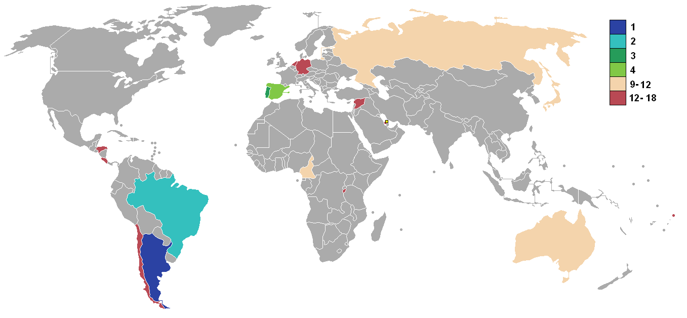 Copa disputada en Catar